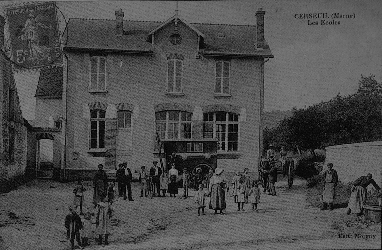 vue ancienne.